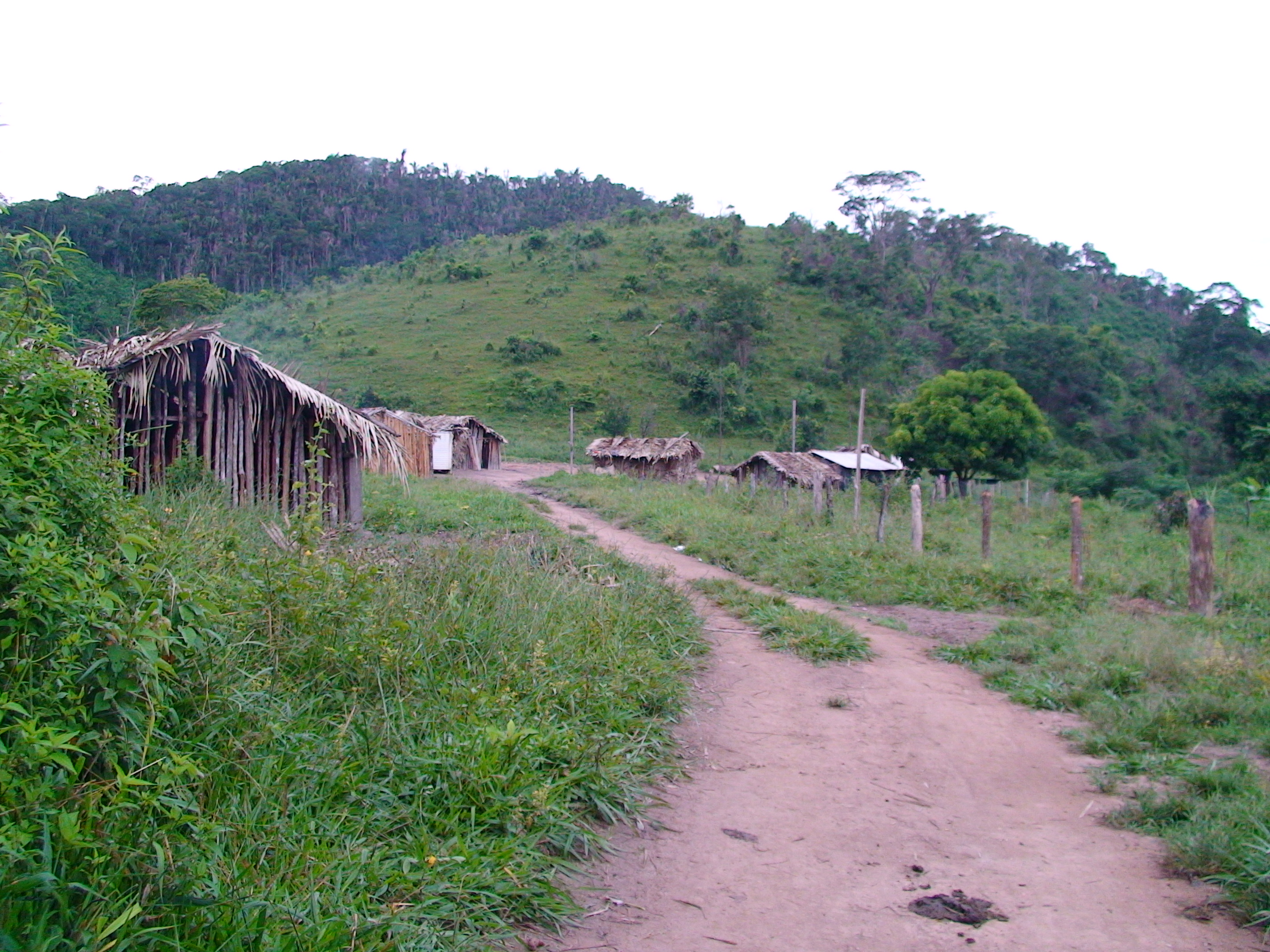 Aldeia Verde